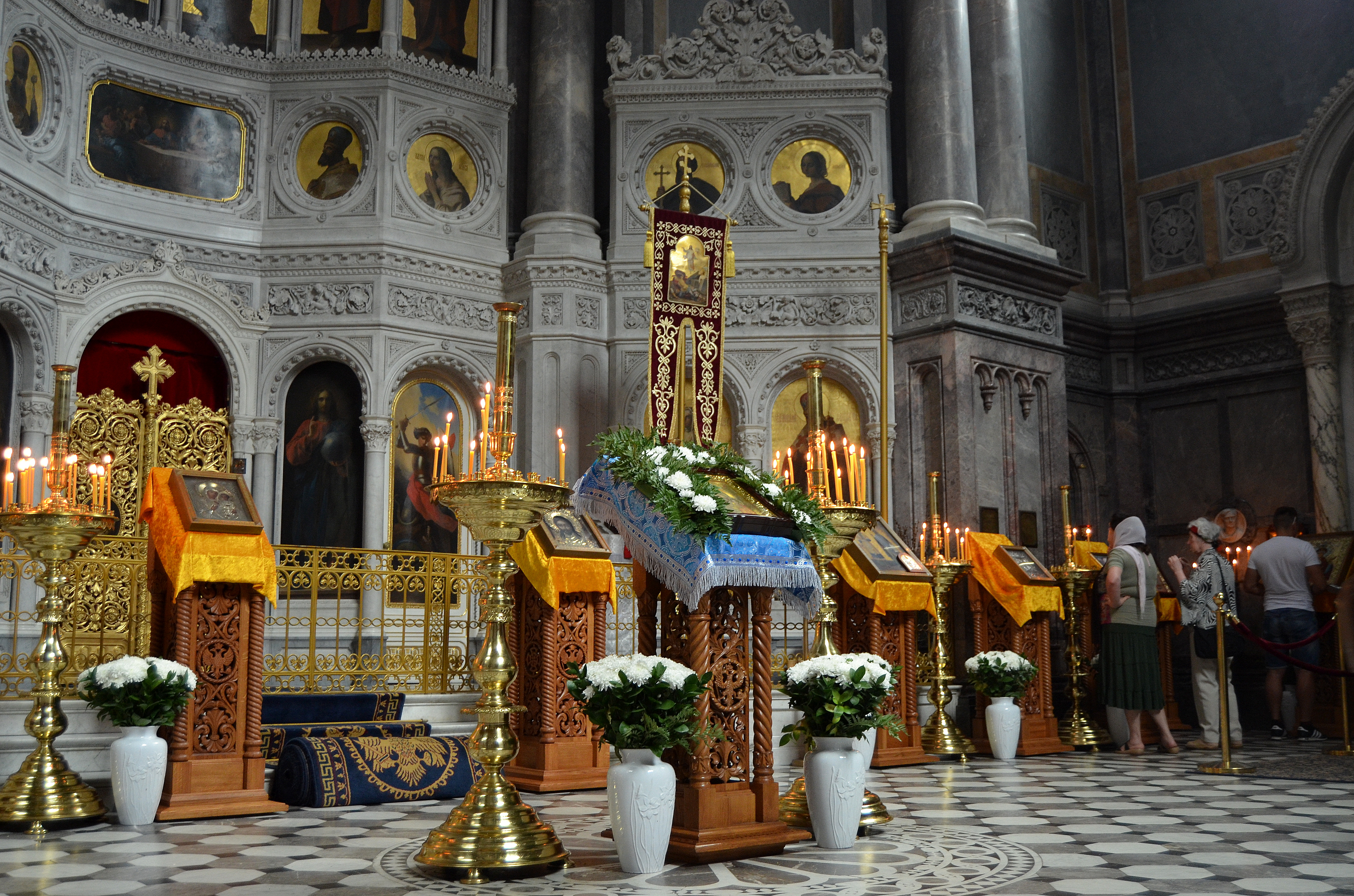 Interieur van de Russisch-orthodoxe kerk